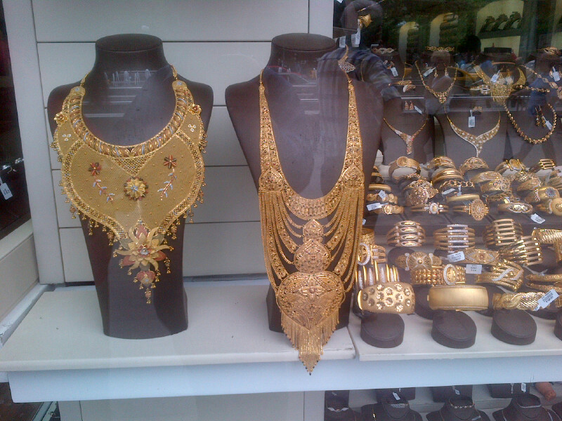 Dos collares y unas pulseras de oro en el vitrina de una joyeria en Ankara, Turquia.